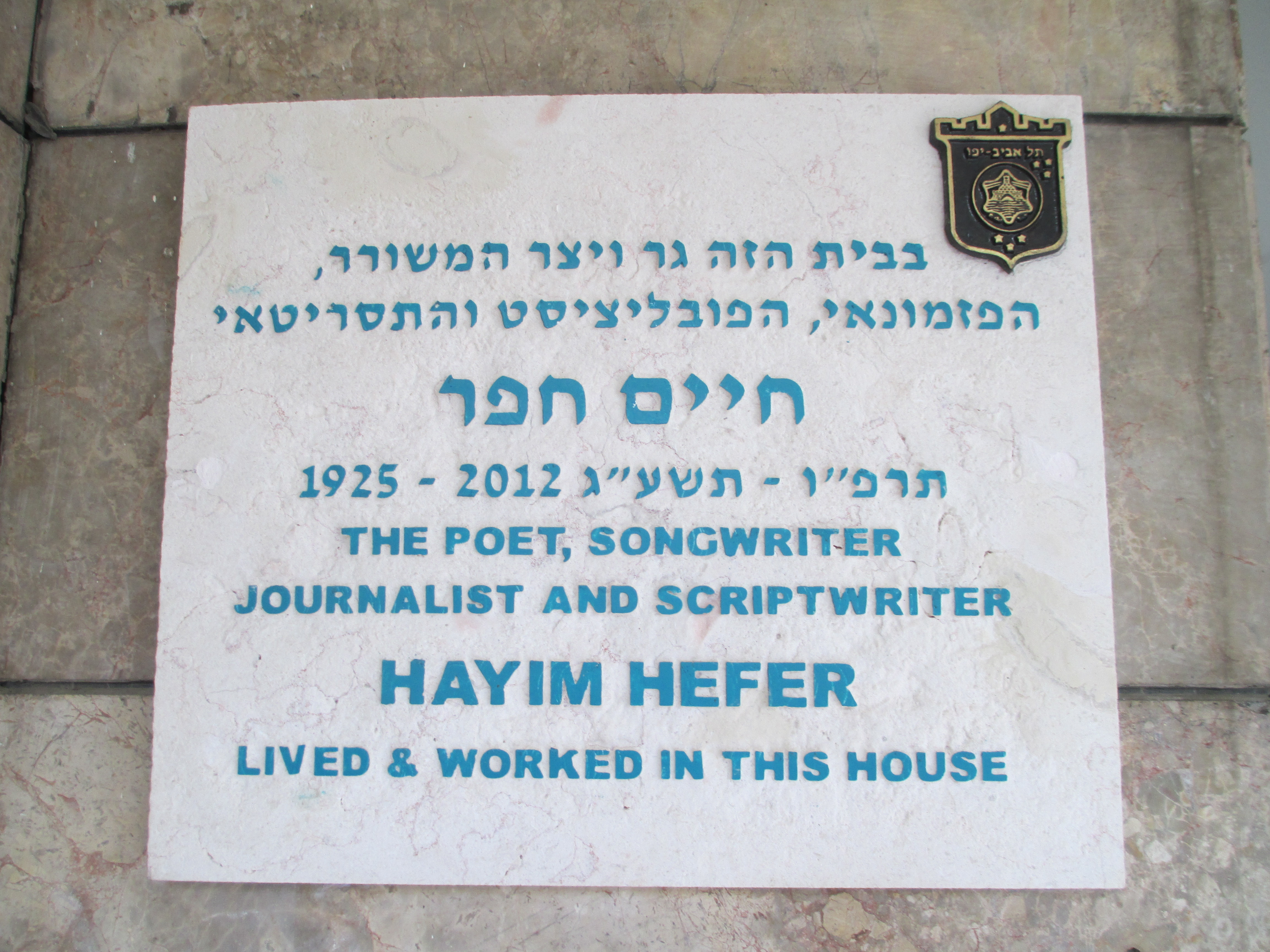 לוחית זיכרון בכניסה לביתו של חיים חפר ברח' ארלוזורוב 53 בתל אביב